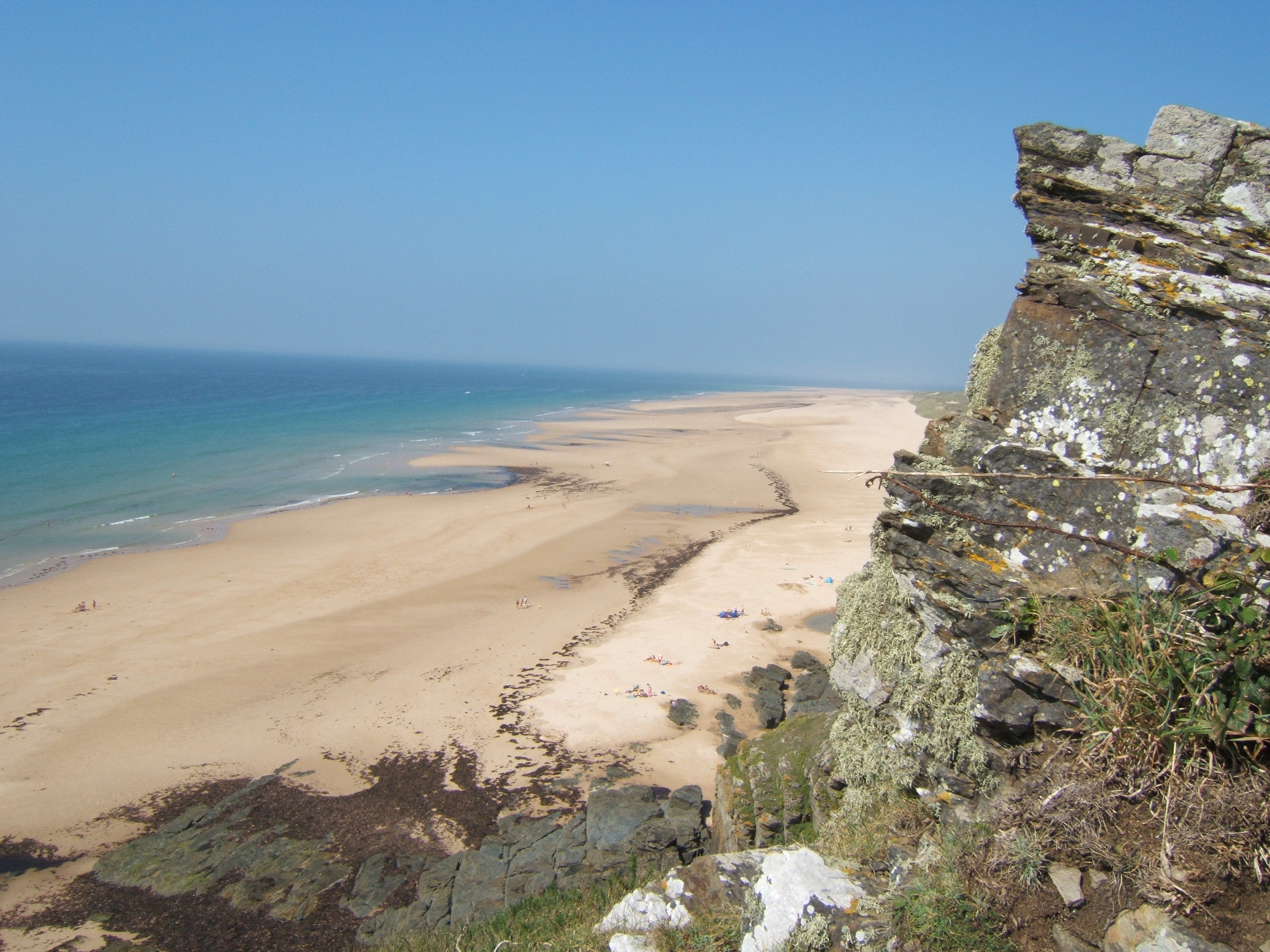 La plage de Carteret vue du Cap Carteret dans le Cotentin.